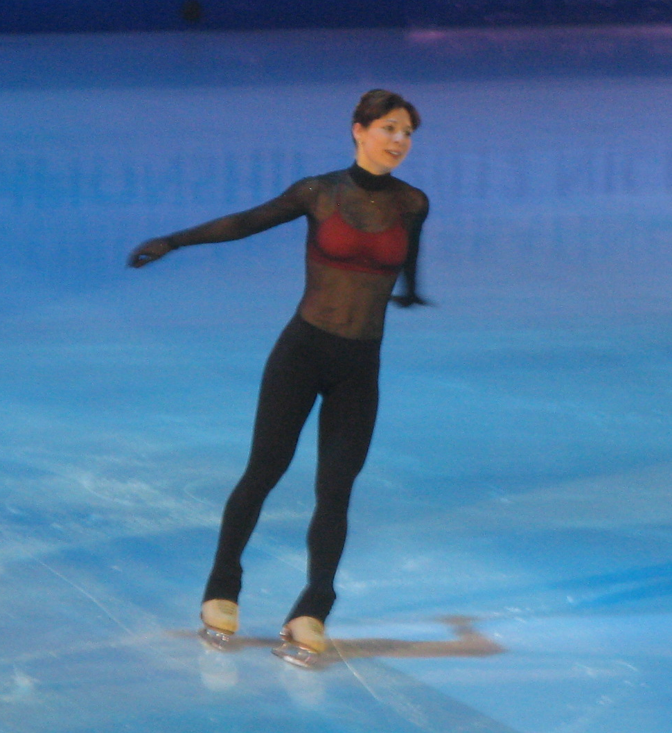 Alena Leonova au gala des Championnats du monde de patinage artistique 2012 à Nice.